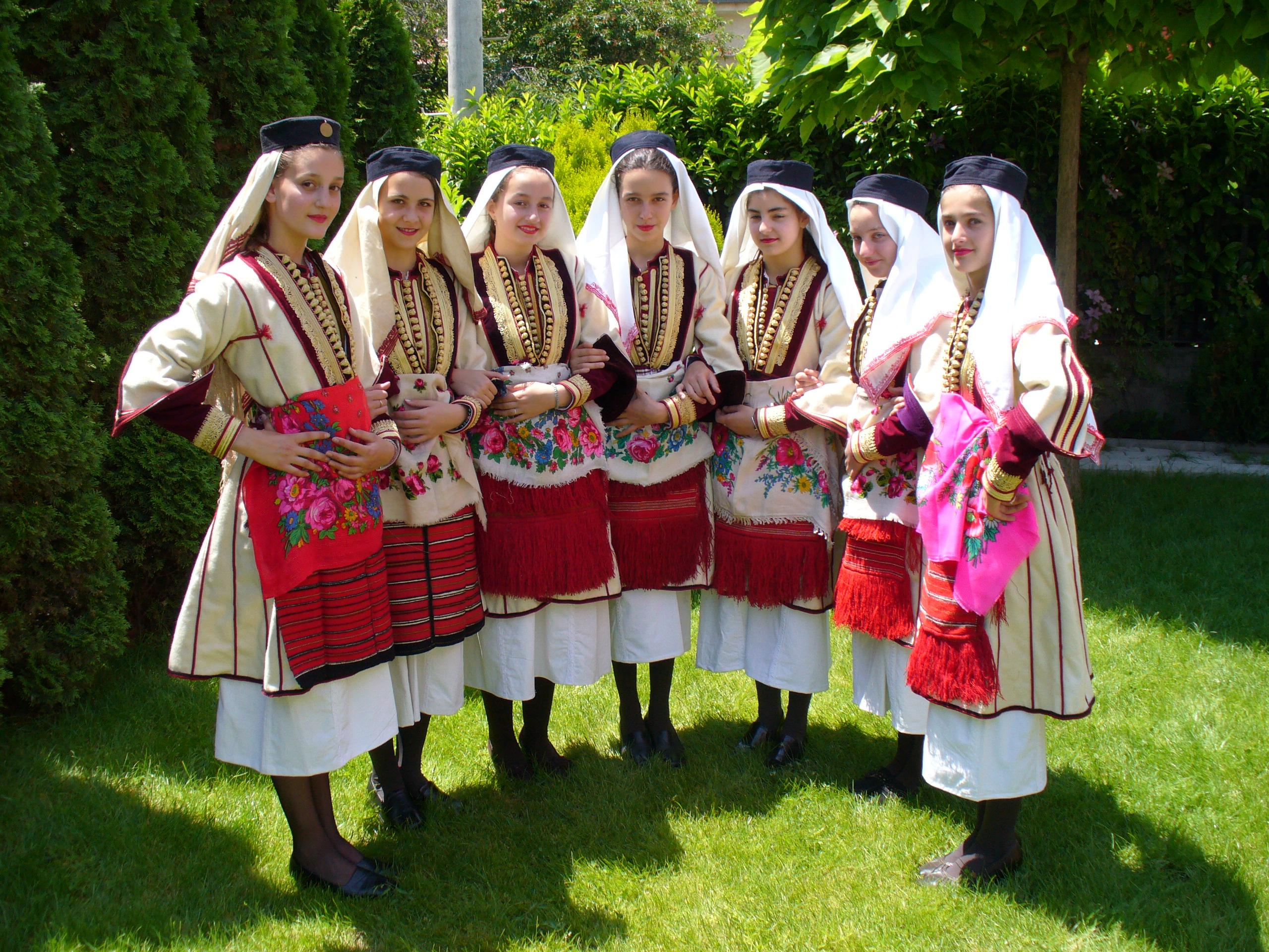 Mijačka mominska nosija